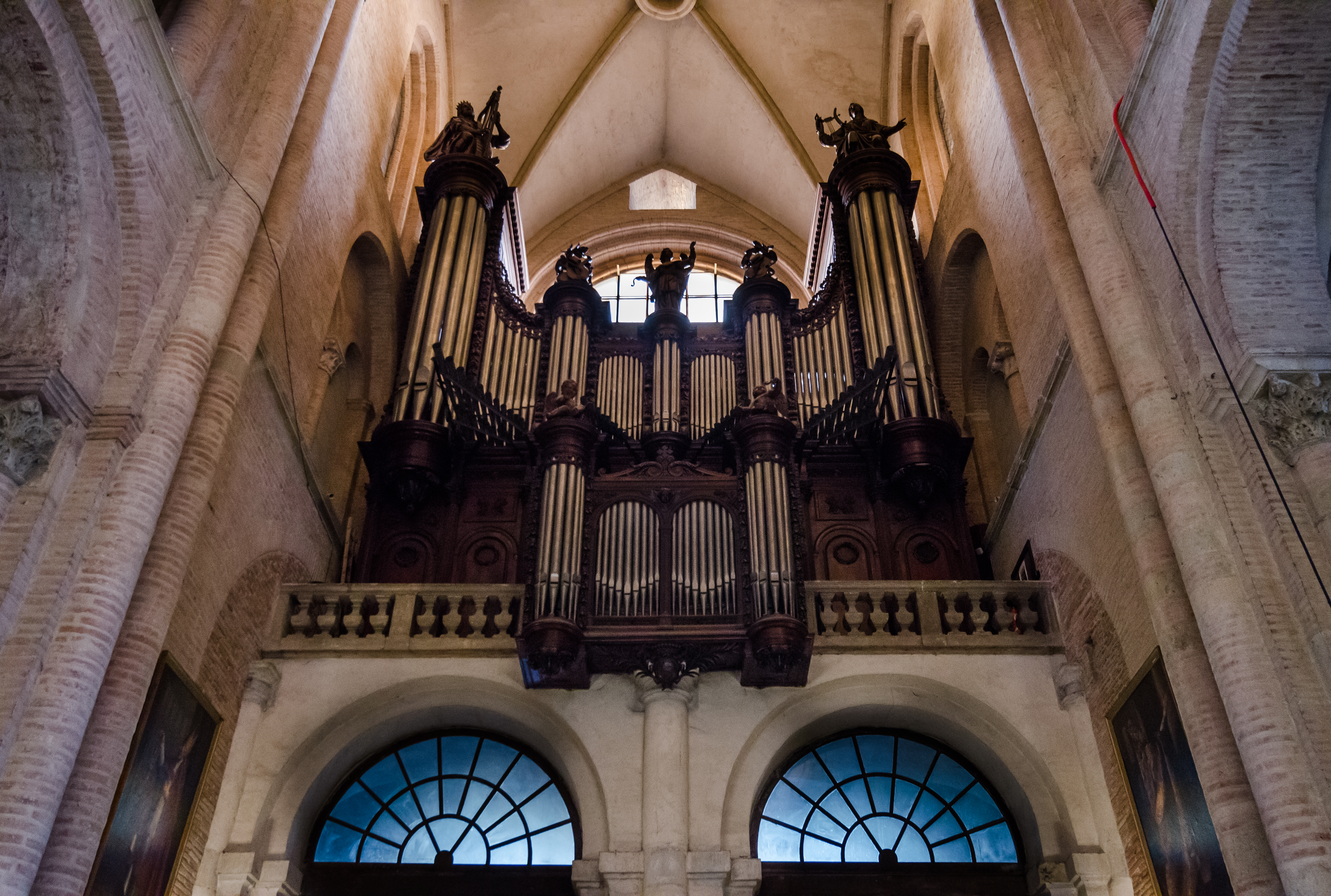 Orgue de la basilique Saint-Sernin